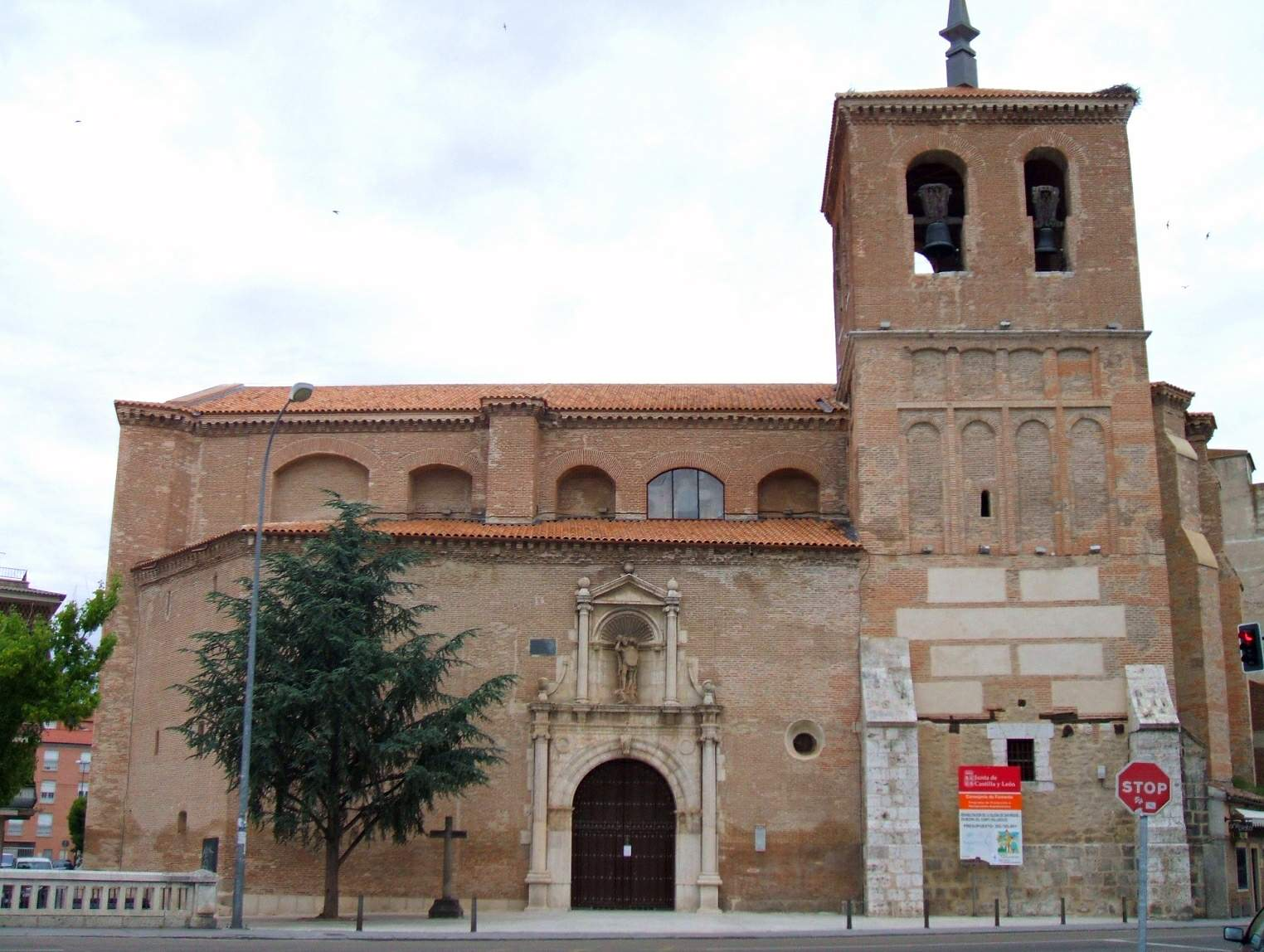 Iglesia de San Miguel (Medina del Campo)